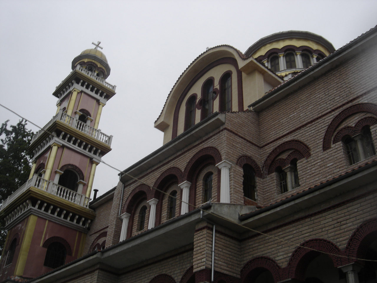 A church in Peristassi.